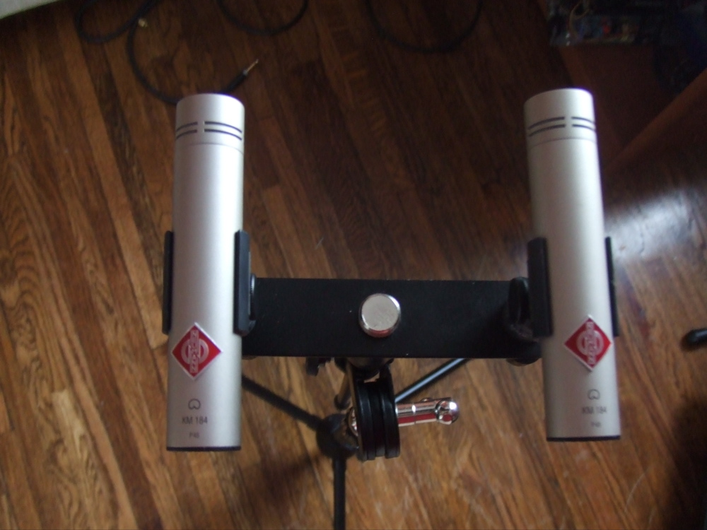 Micros colocados en tecnica estereofocnia AB